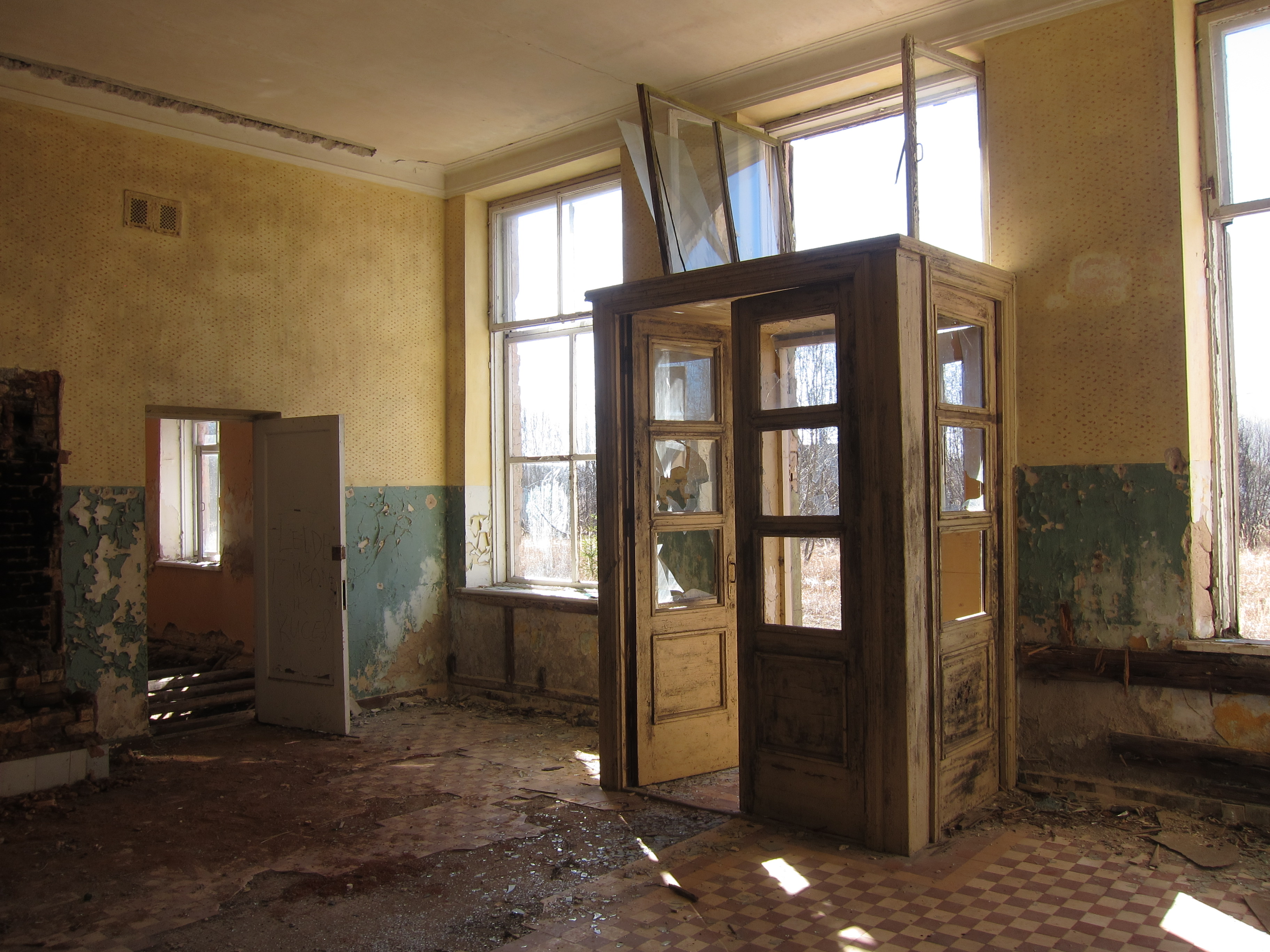 Puikules stacijas uzgaidāmā telpa